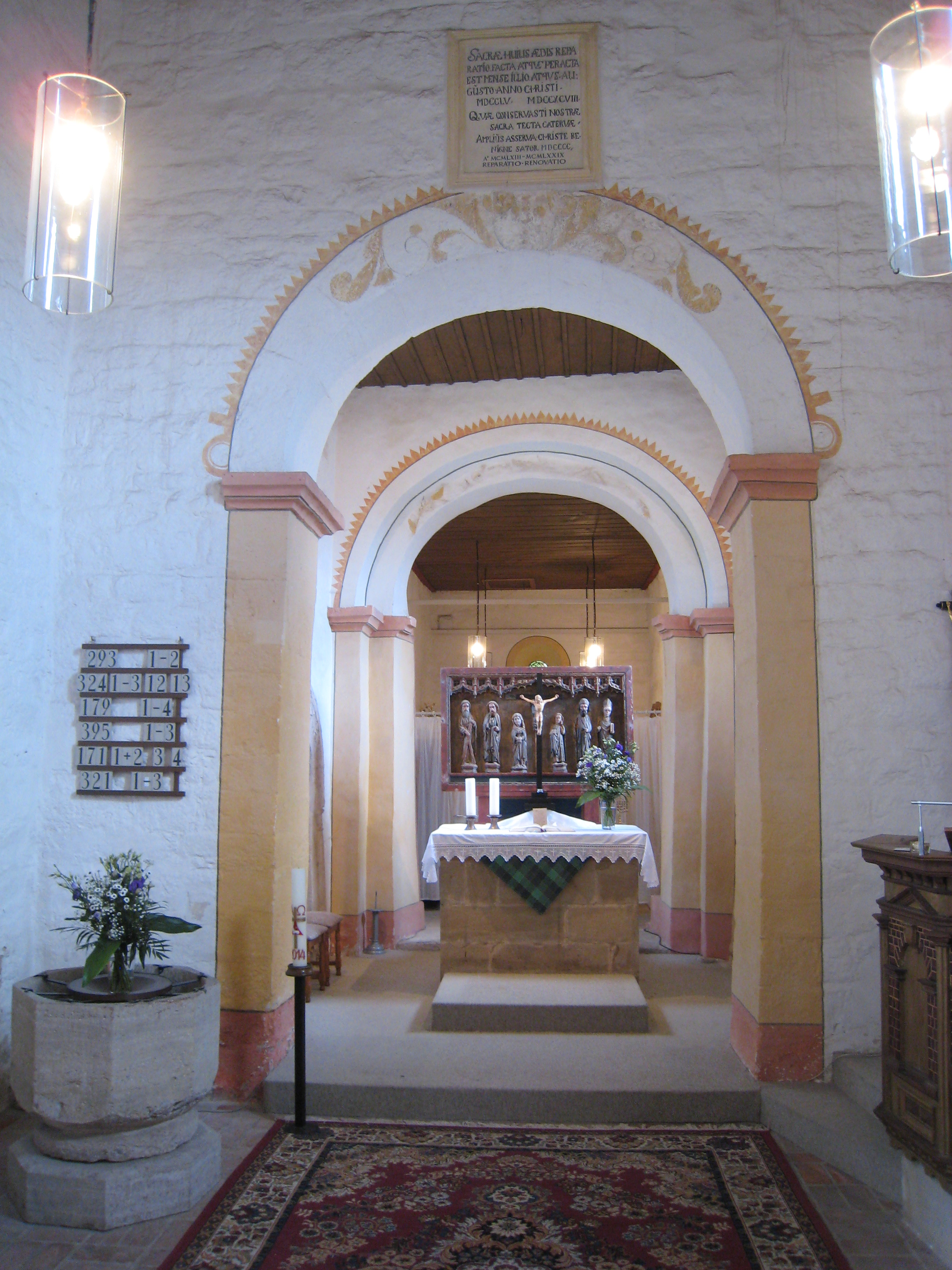 Chor der Nikolaikirche in Oberndorf (Arnstadt)